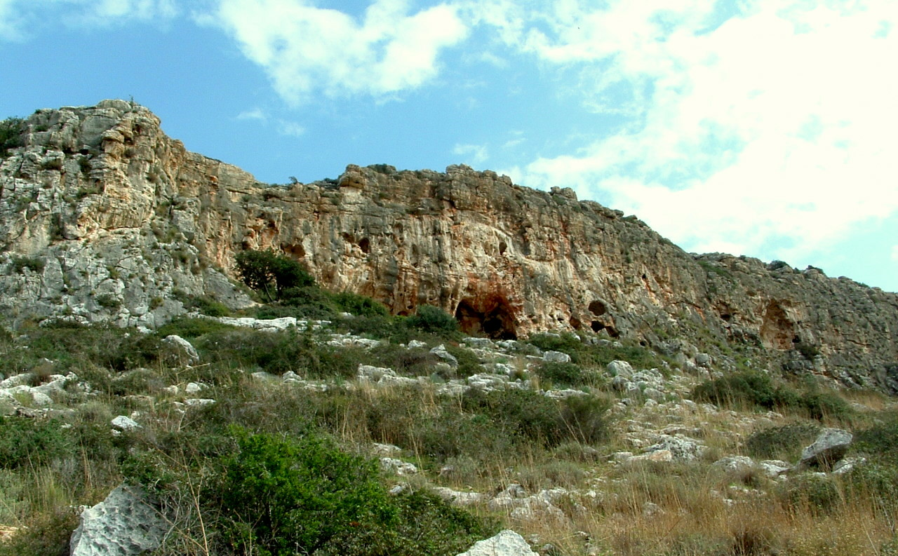 Megadim Cliff Mount Carml - Israel, in center Misliya Cave מצוק מגדים מישור החוף הצפוני הר הכרמל מערת מיסליה